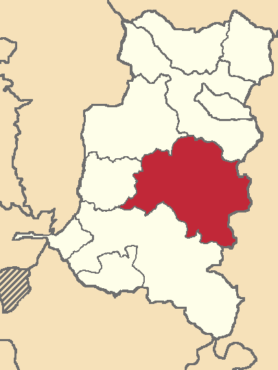 Mapa localizacor del cantón en Chimborazo, Ecuador